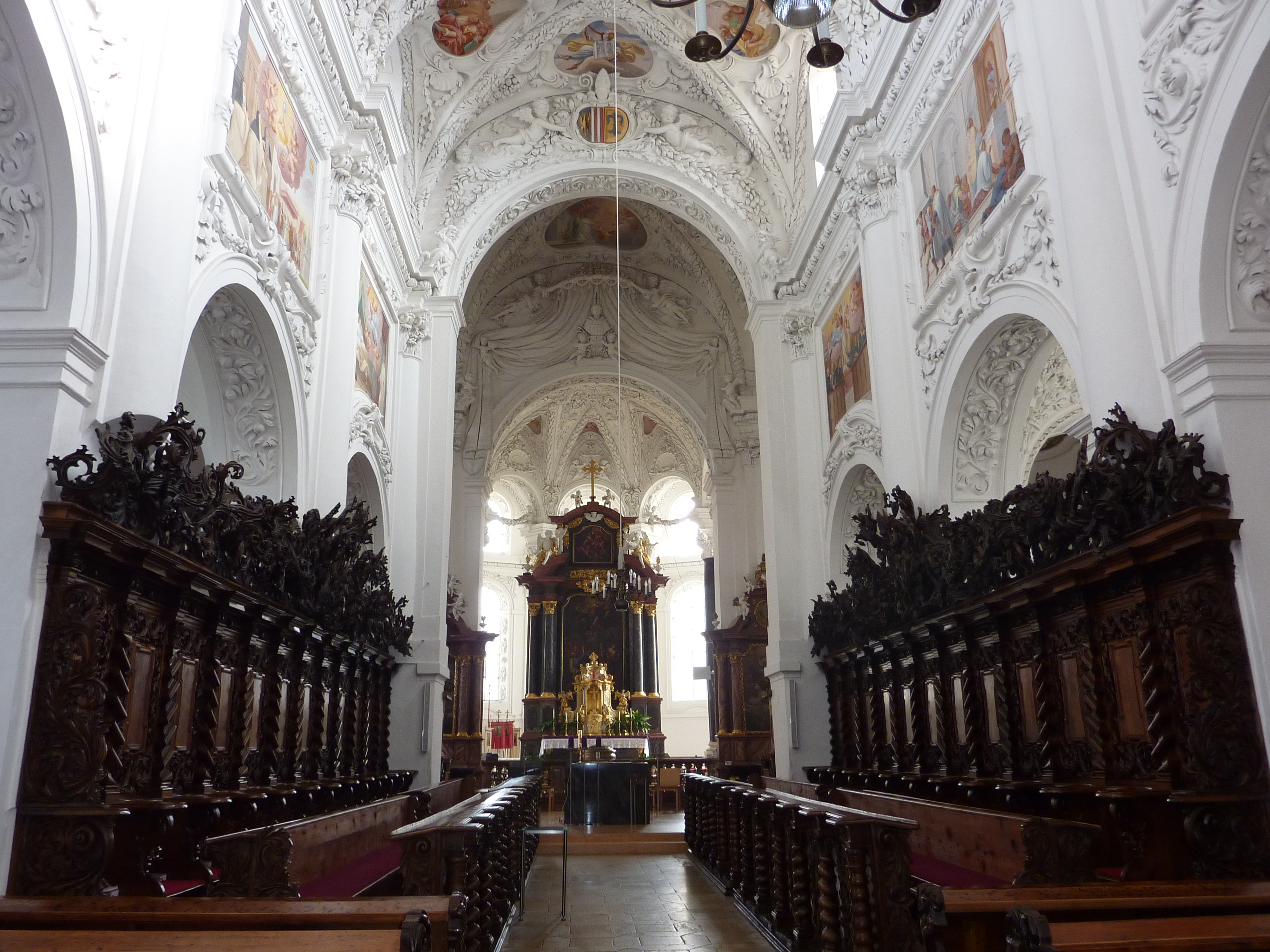 Pfarrkirche Mariä Himmelfahrt, ehem. Zisterzienserstiftskirche, Stift Baumgartenberg, Oberösterreich